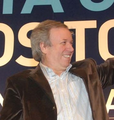 Daniel Peralta. Gobernador Santa Cruz. Argentina